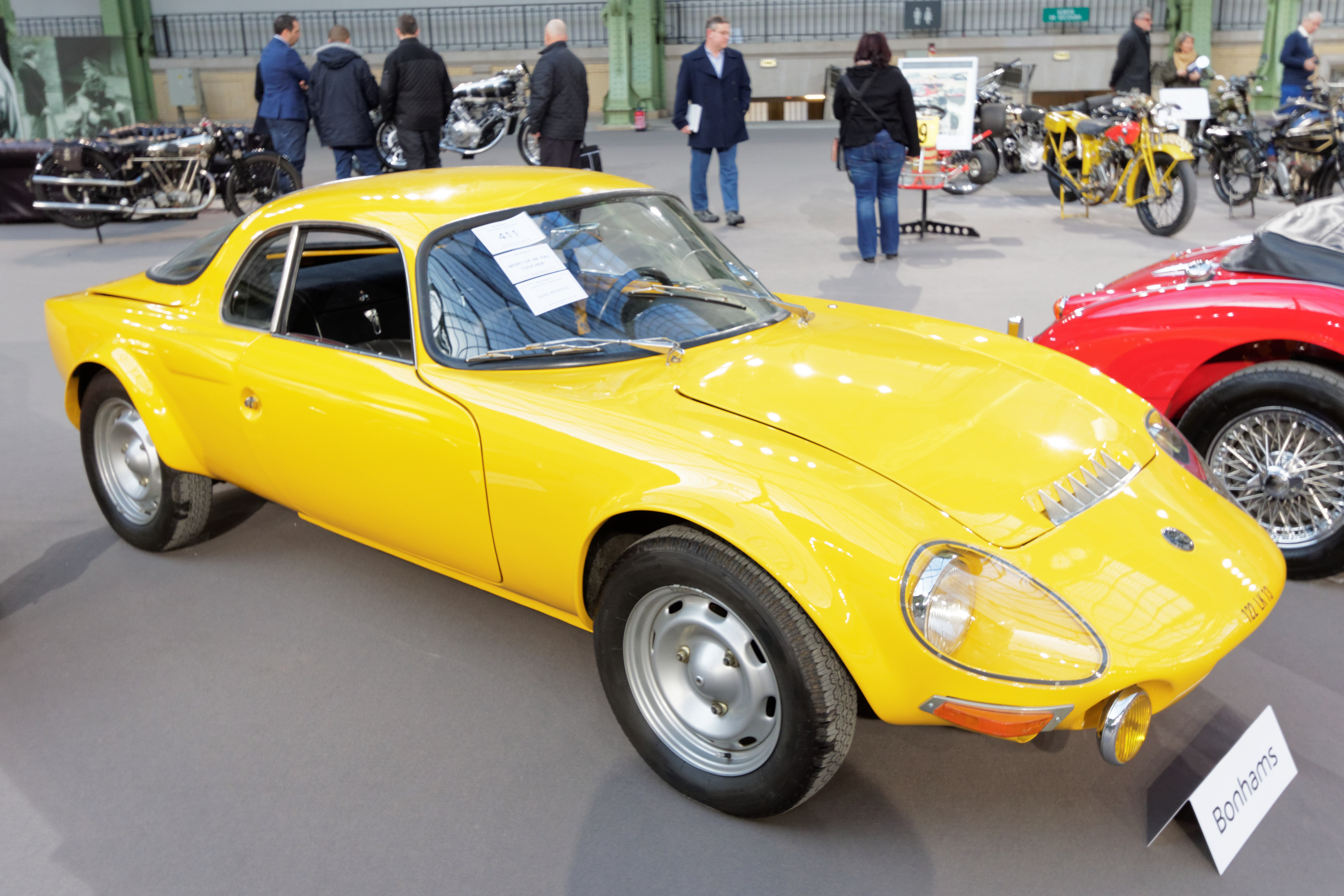 Un des véhicules présenté lors de la vente aux enchères Bonhams 2015 au Grand Palais de Paris.